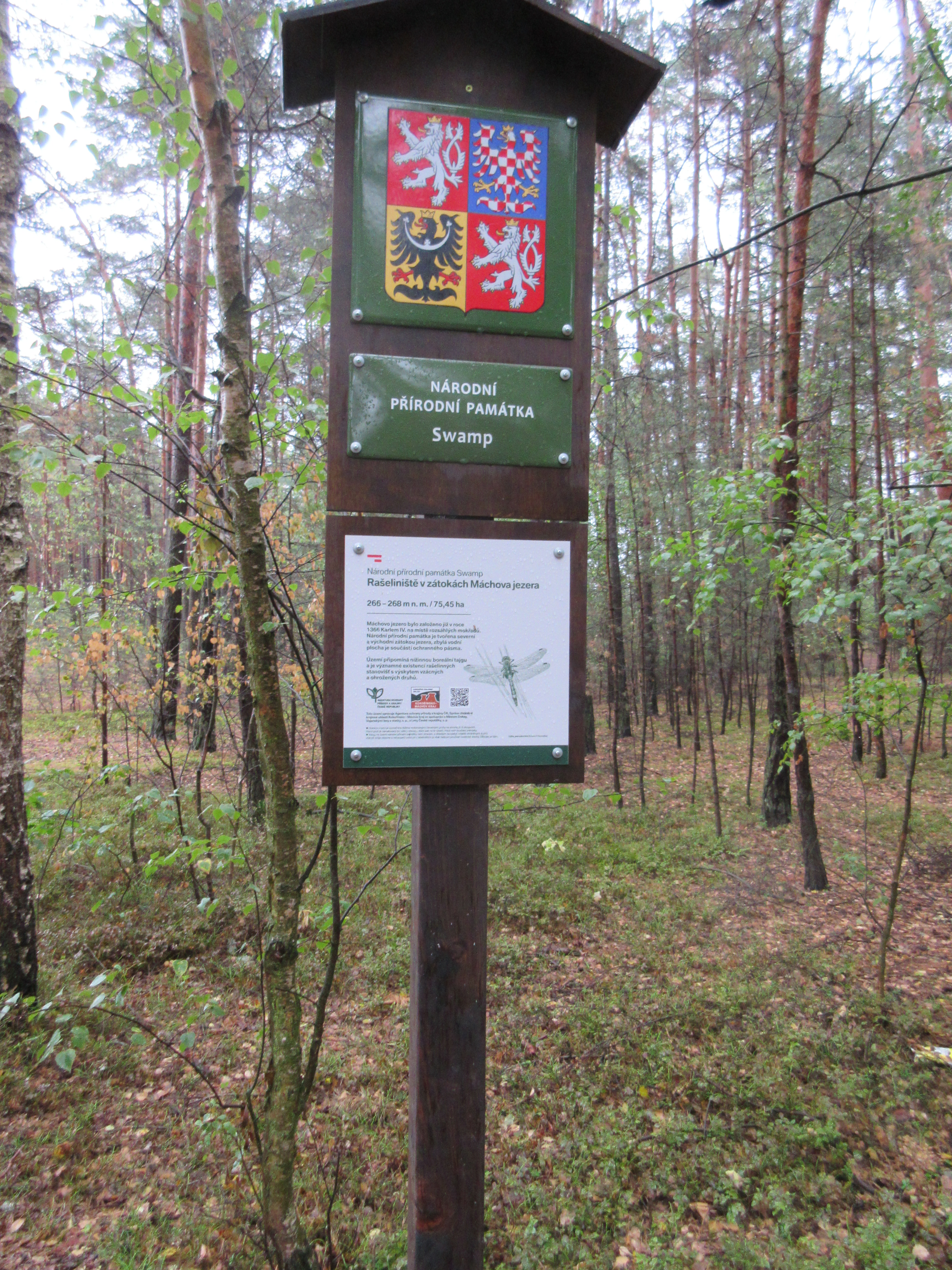 Nový typ tabule u Máchova jazera